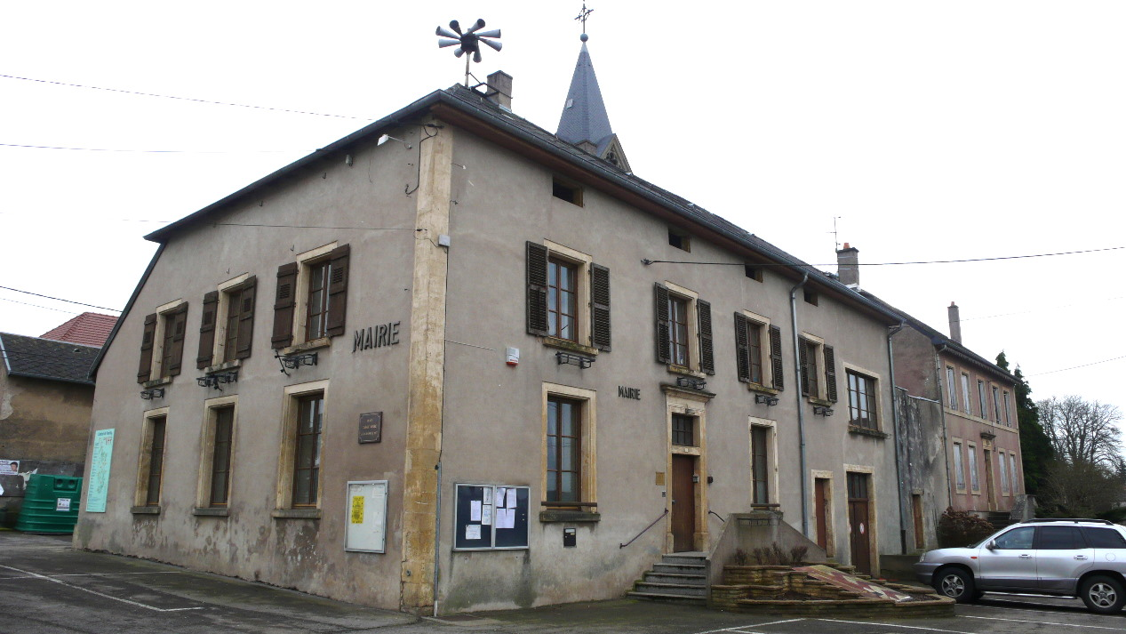 Gemeng vun Angevillers.